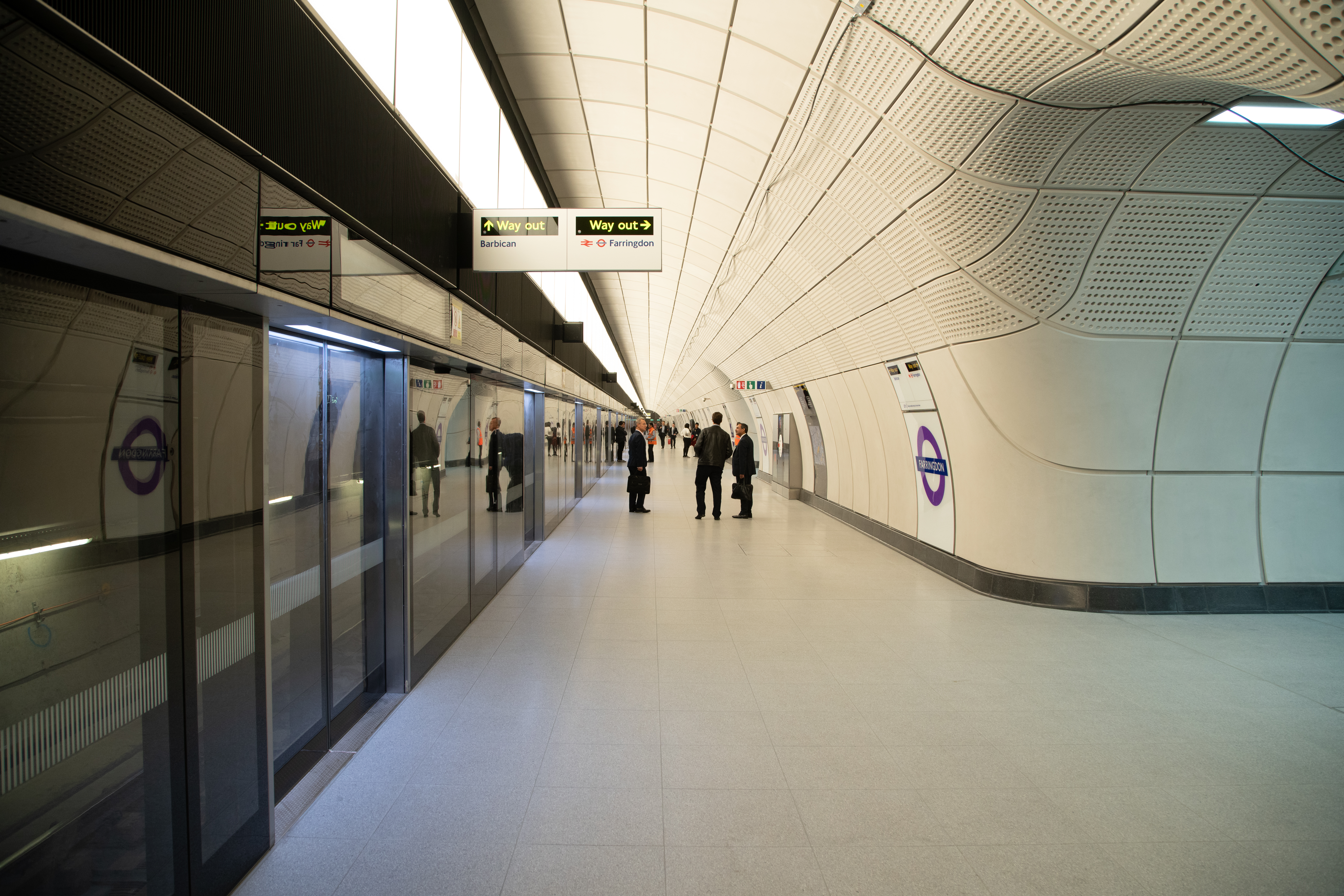 _DSC0656